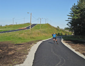 Tankimägi